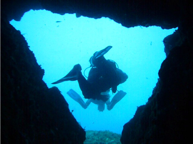 Grotta della Colombara, diving in Portofino, Italy